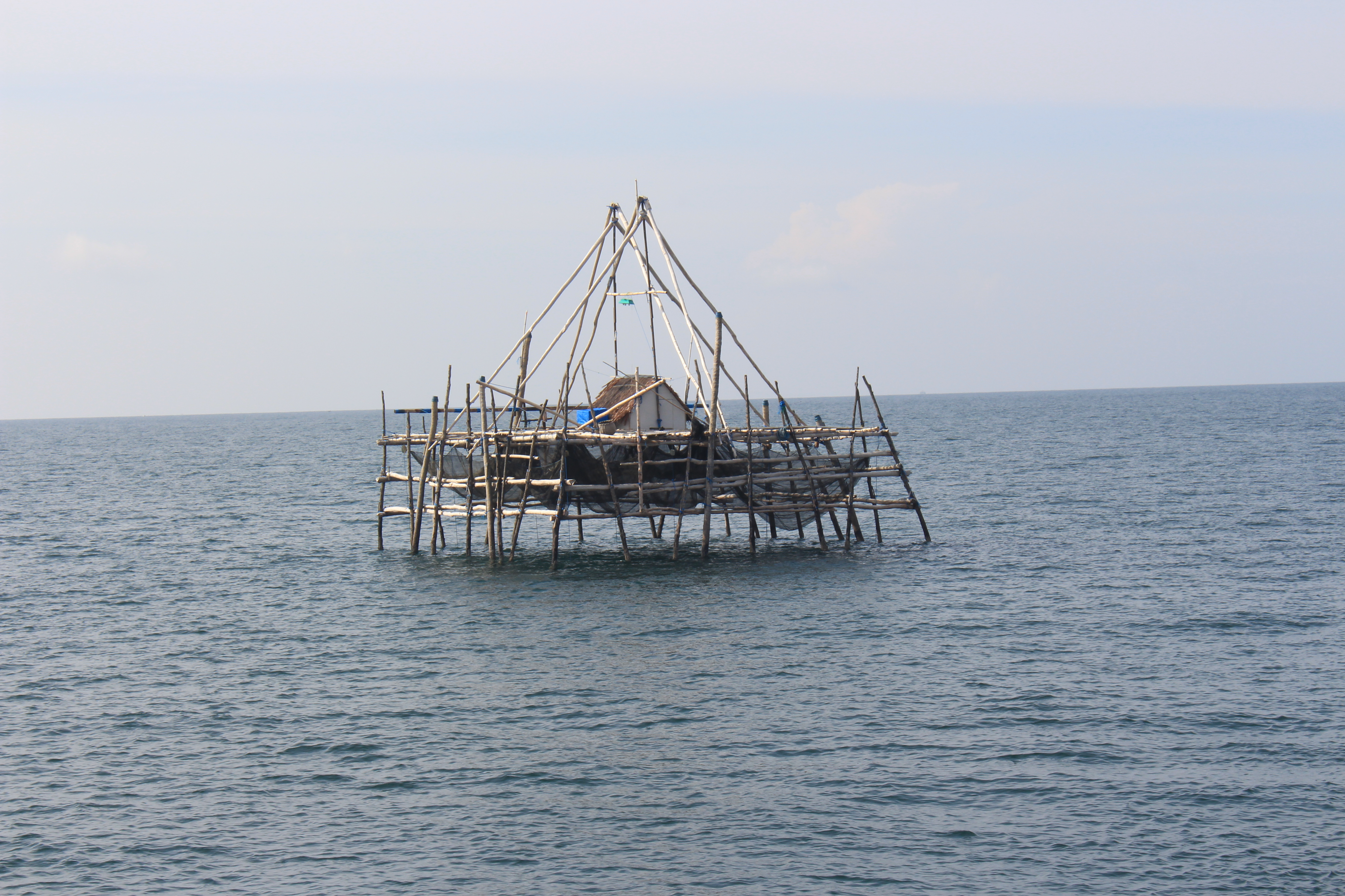 Sebuah bagan tancap di lepas pantai Sebamban, Kalimantan Selatan.